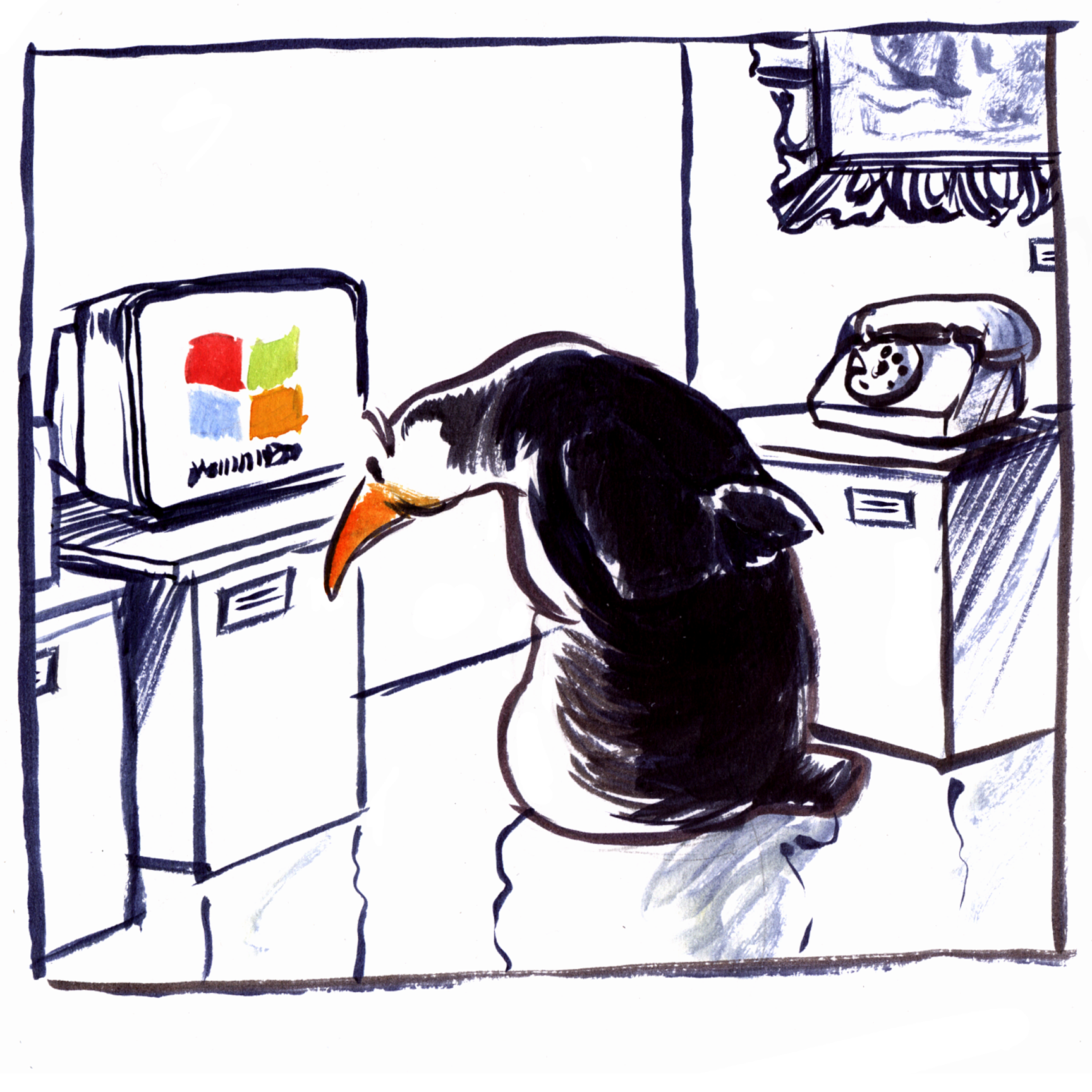 Illustration pour le site Framasoft.